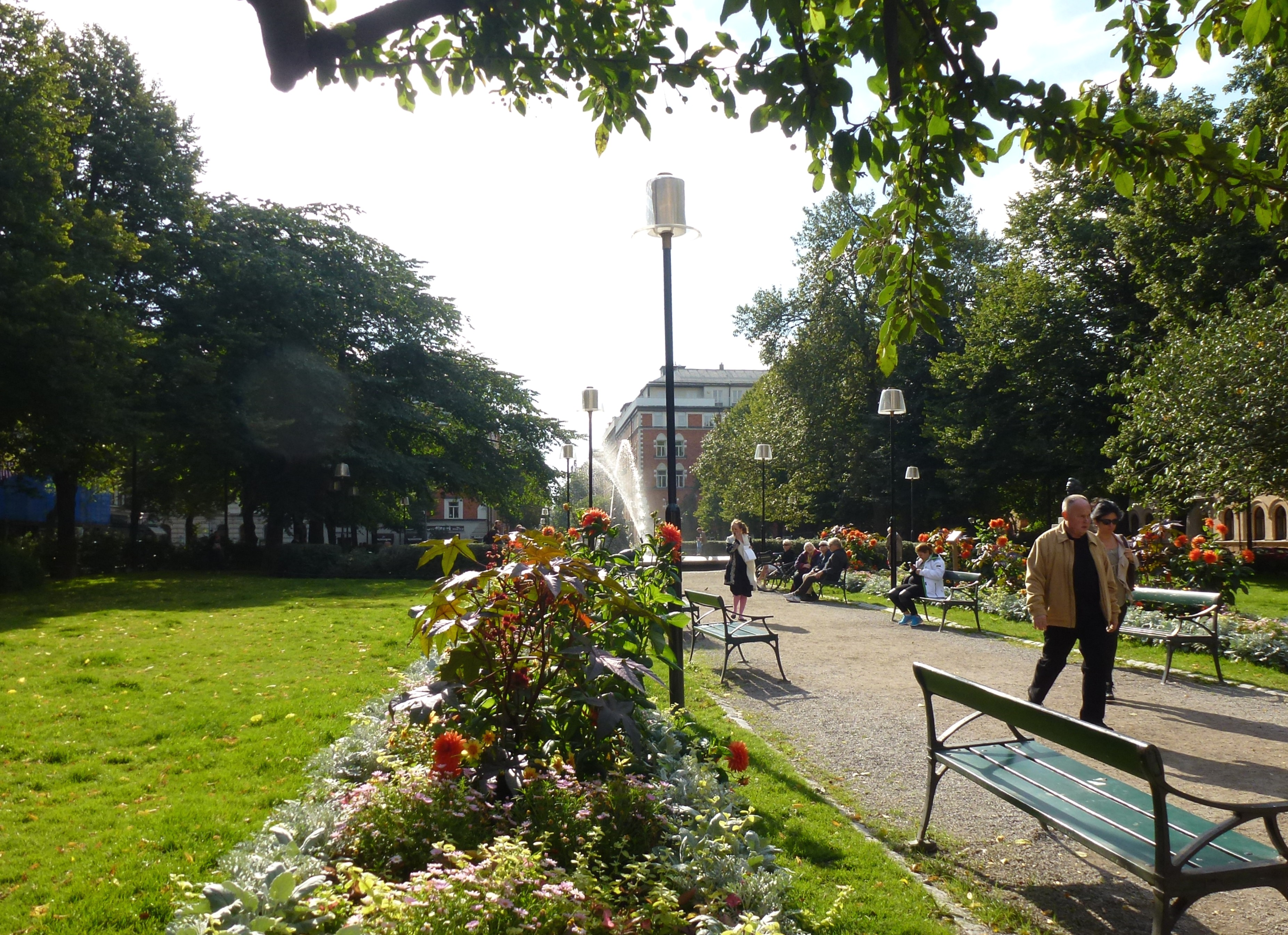 Mariatorget mot syd